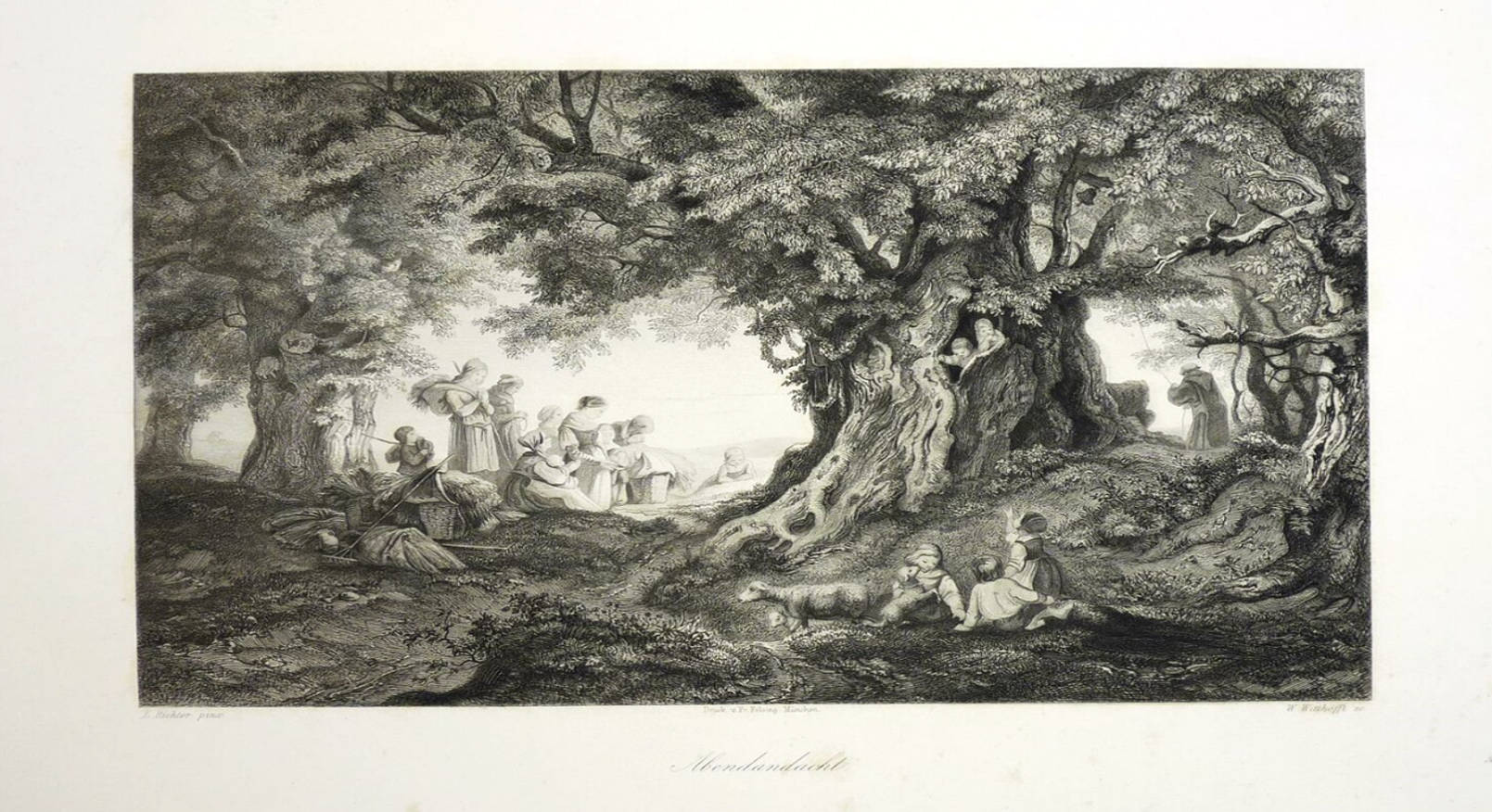 Abendandacht: Lithografie (Stahlstich) von 1842; Erstmals erschienen beim Verlag Mayer & Wigand; Skizzenzeichnung: Ludwig Richter; Stahlstecher: Wilhelm Witthöft. Der Stich wurde nicht nach dem Originalbild Richters, sondern nach einer ersten Skizze von ihm erstellt.